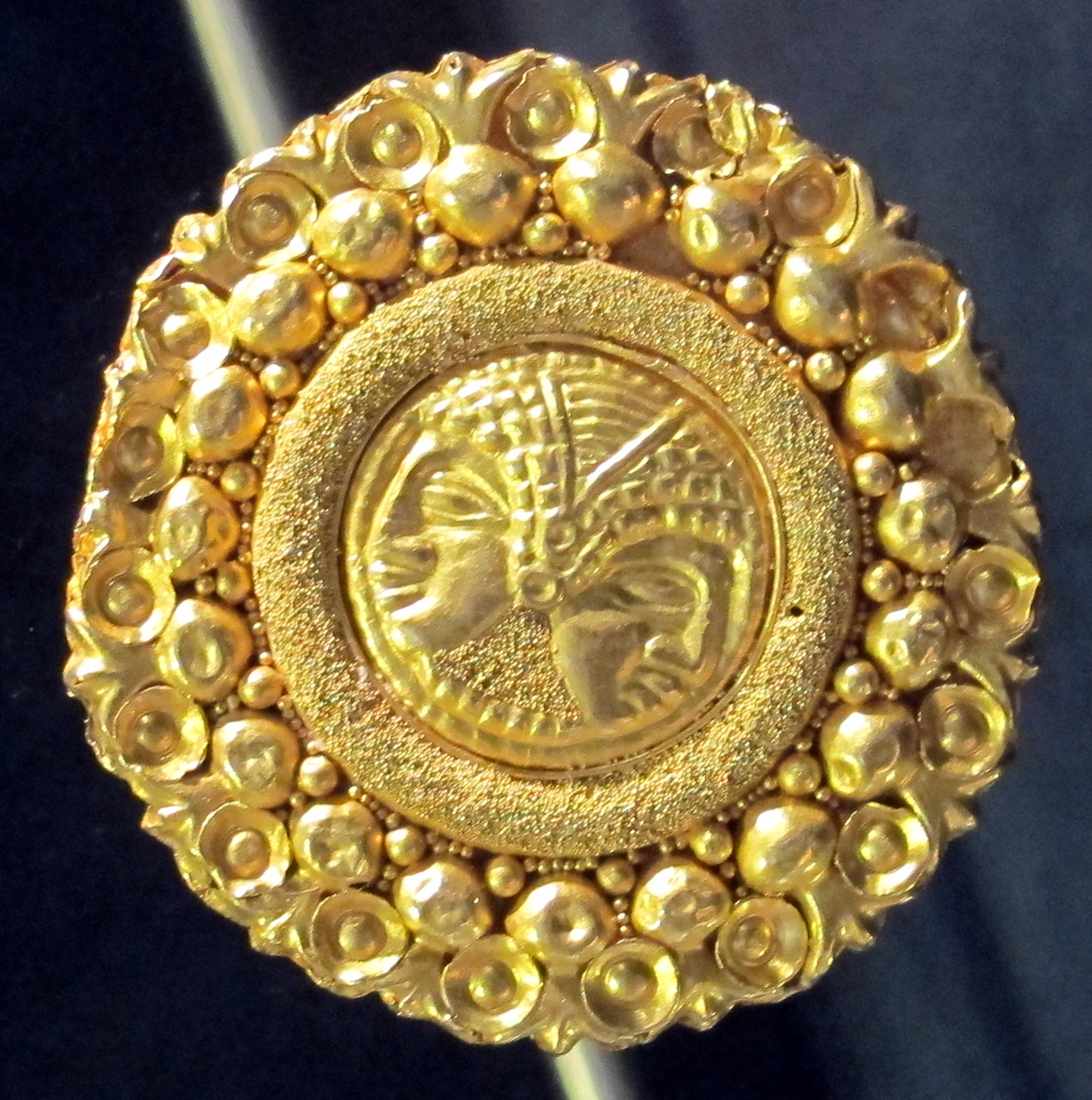 Museo Archeologico Nazionale - MIBAC This is a photo of a monument which is part of cultural heritage of Italy.